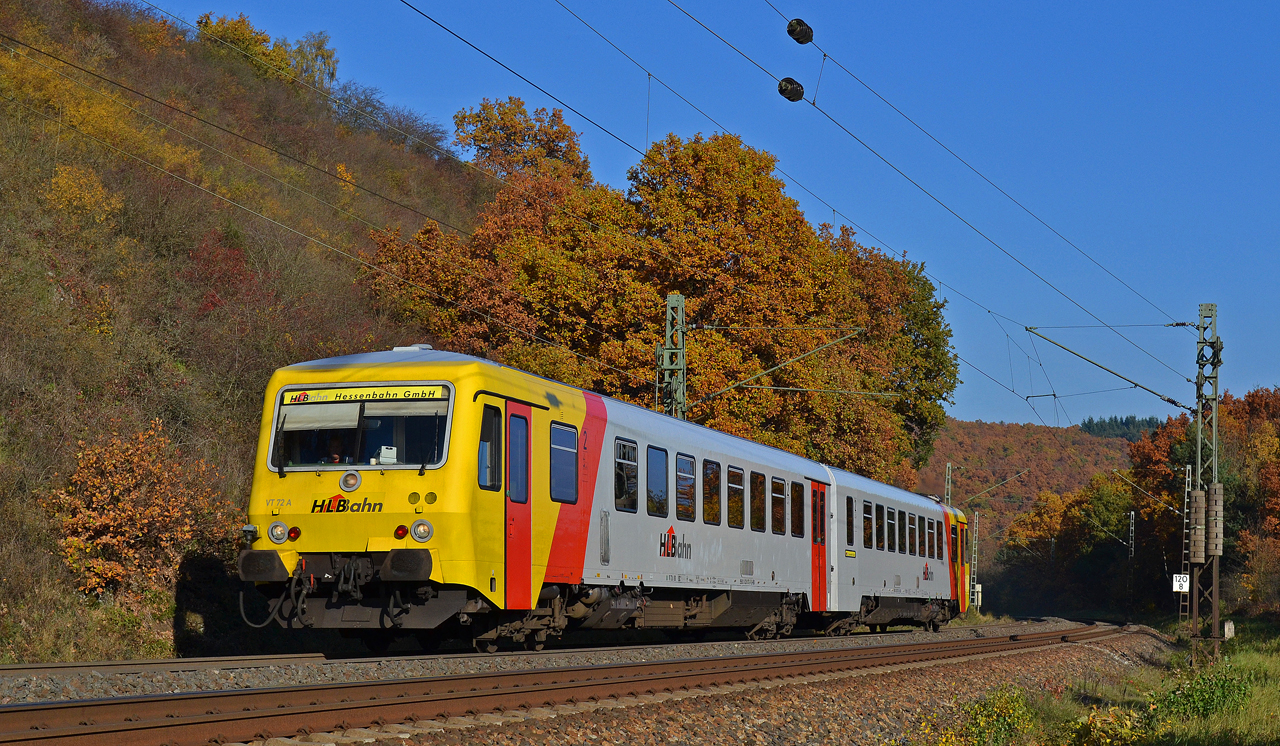 Ein Dieseltriebwagen der Baureihe 628 der Hessischen Landesbahn auf der Dillstrecke bei Sechshelden (November 2015).